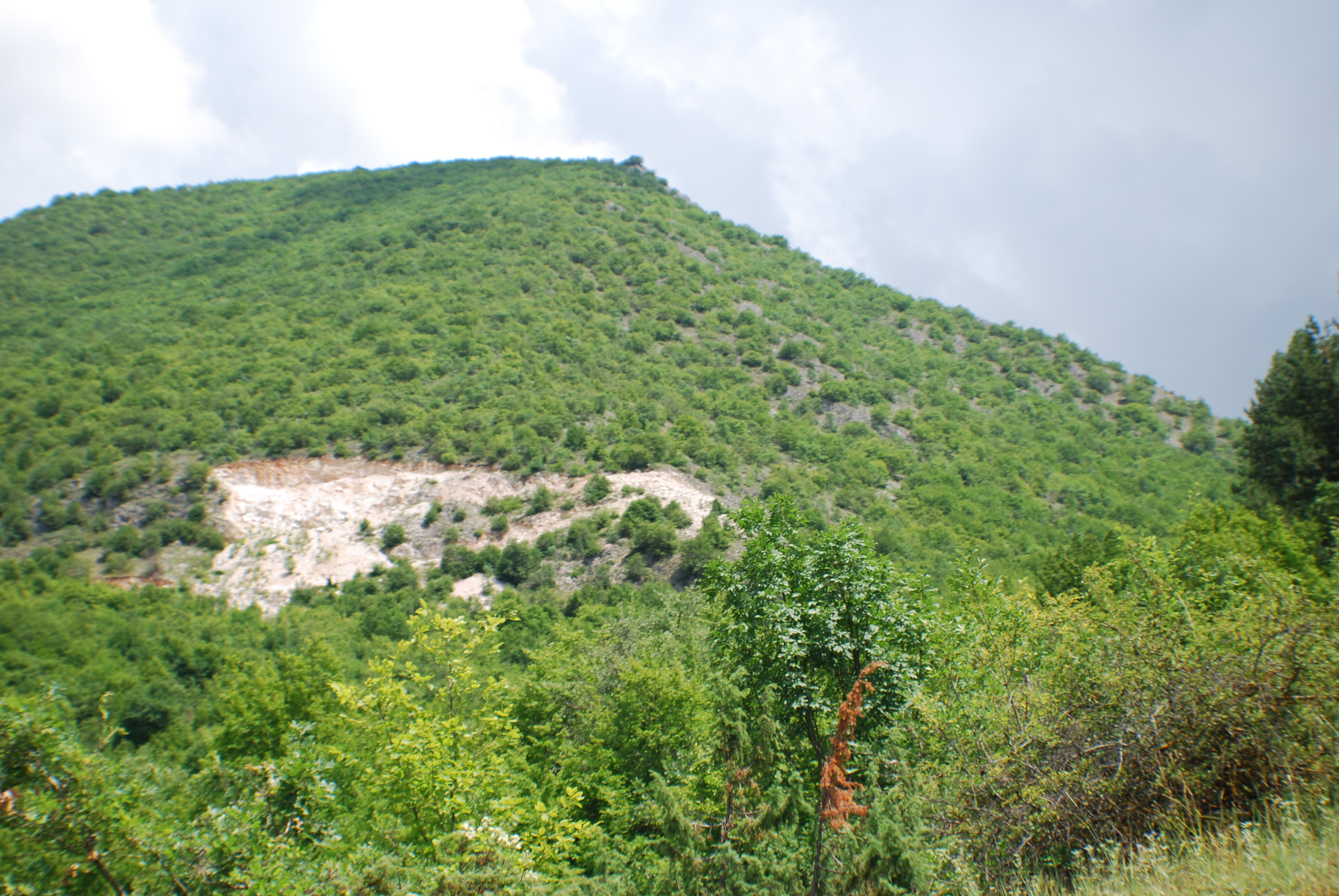 Каменоломот над селото Стенче на Сува Гора